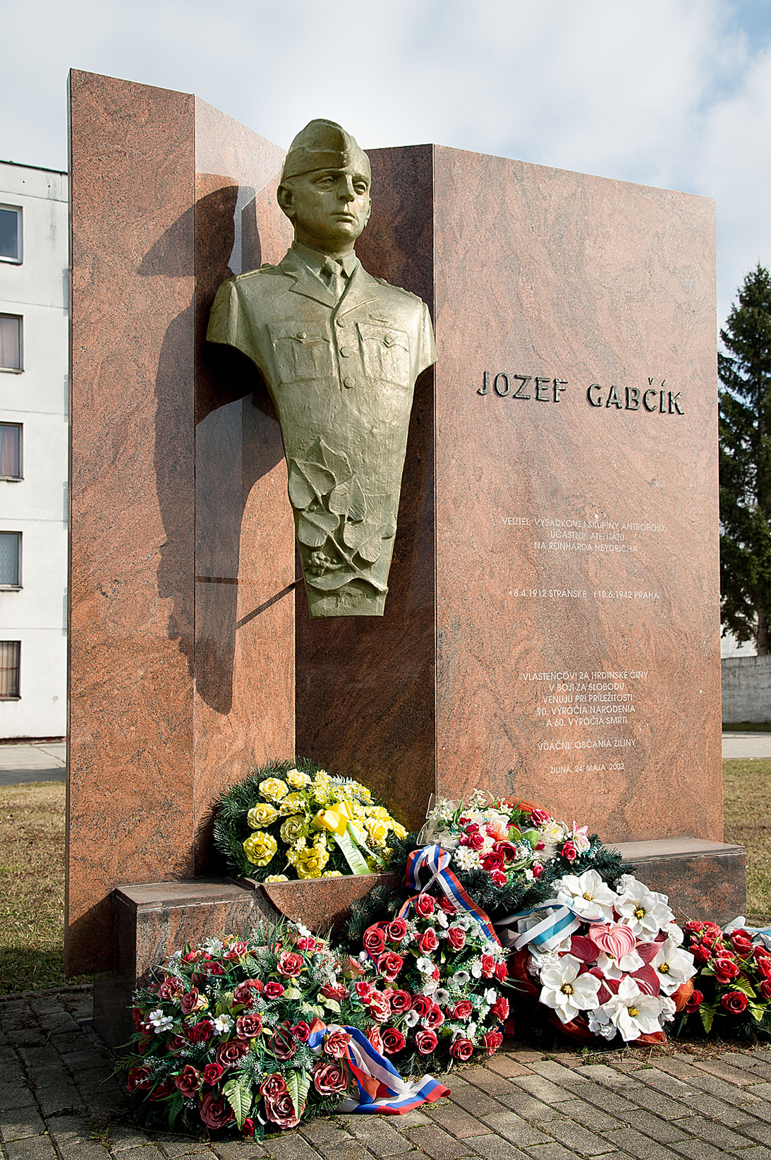 Pamätník Jozefa Gabčíka v Žiline